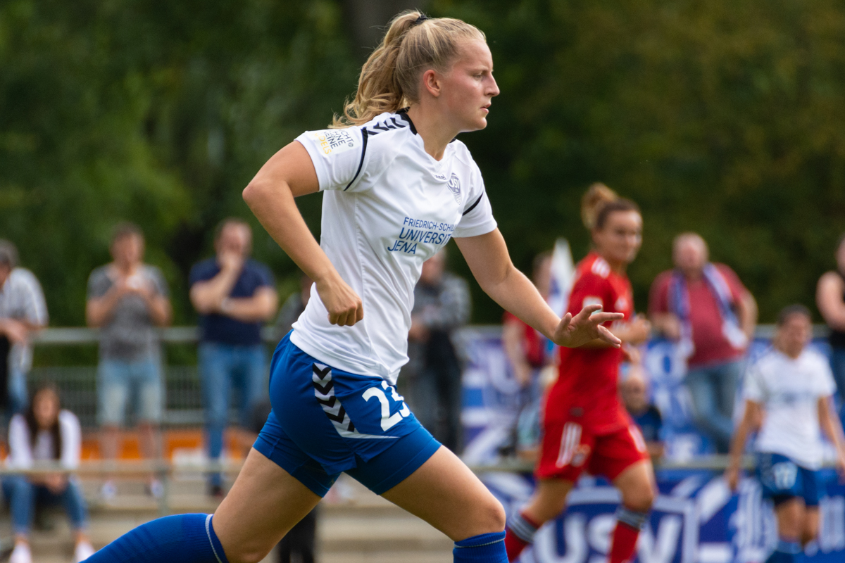 Maren Tellenbröker im DFB-Pokal-Spiel gegen den FC Bayern München